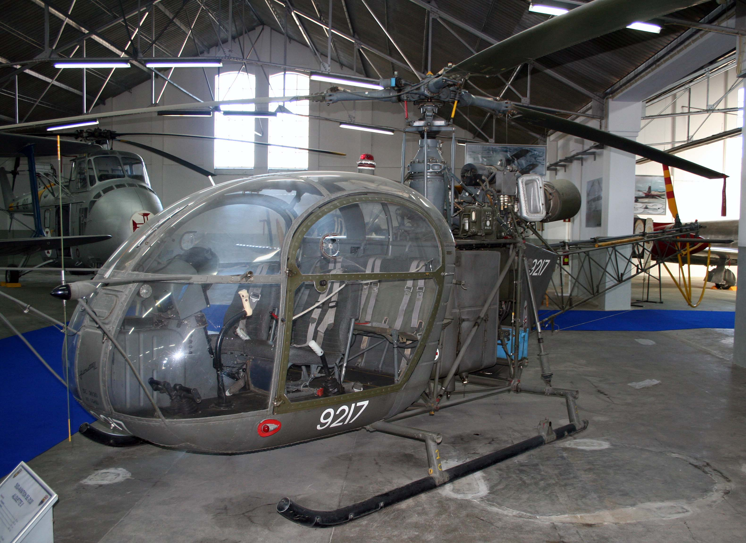 Aérospatiale Alouette II Portuguese Air Force Military Aircraft - Alouette II Source/Author Soares da Silva